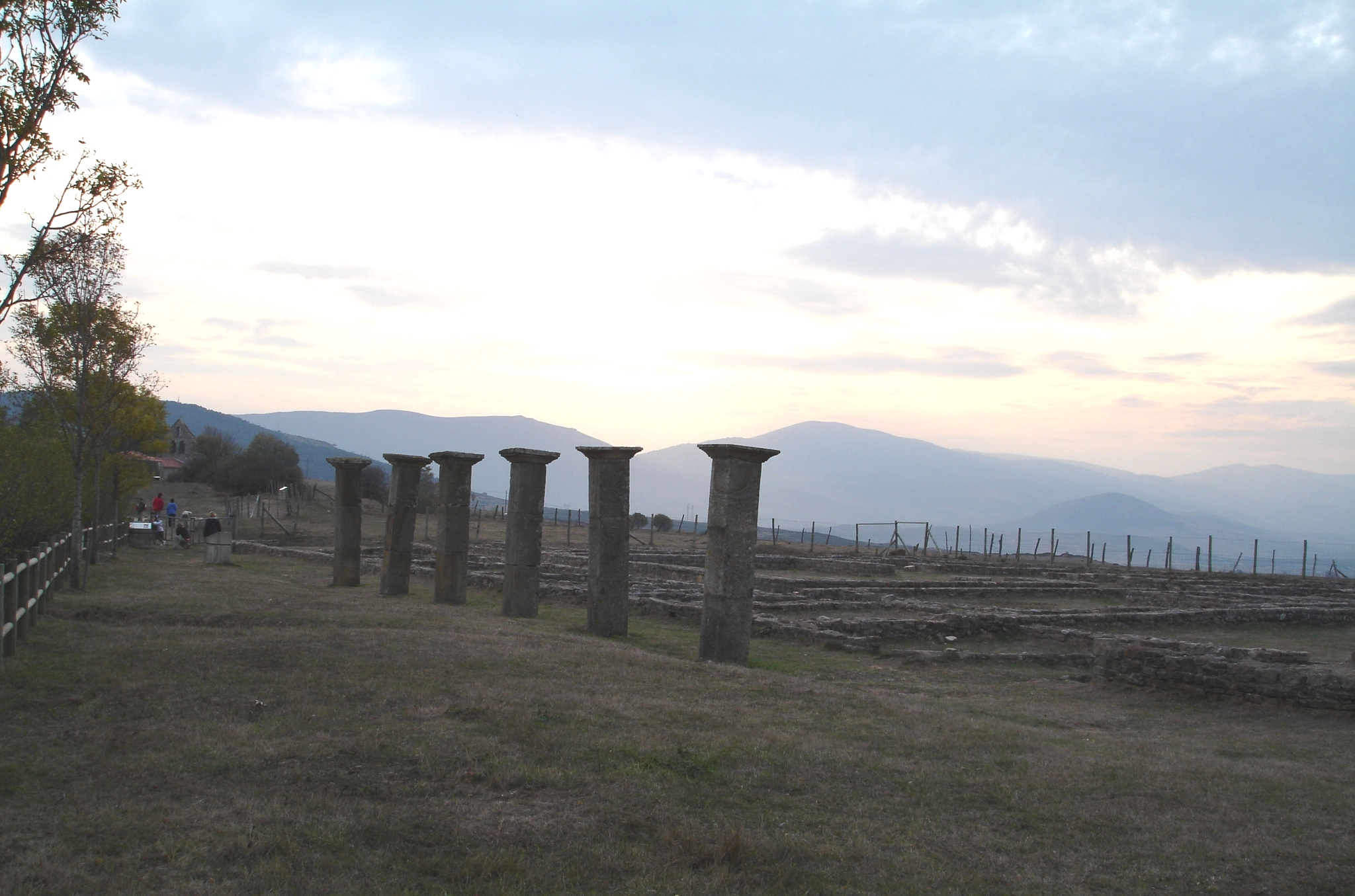 Detalle de las ruinas de Julióbriga. En la foto apreciamos seis columnas de base cuadrada que formaban parte de un edificio porticado que discurría a lo largo del decumanus maximus. Por otro lado, observamos a la derecha de la imagen lo que queda de las plantas de las casas de la Llanuca 1 y 2.